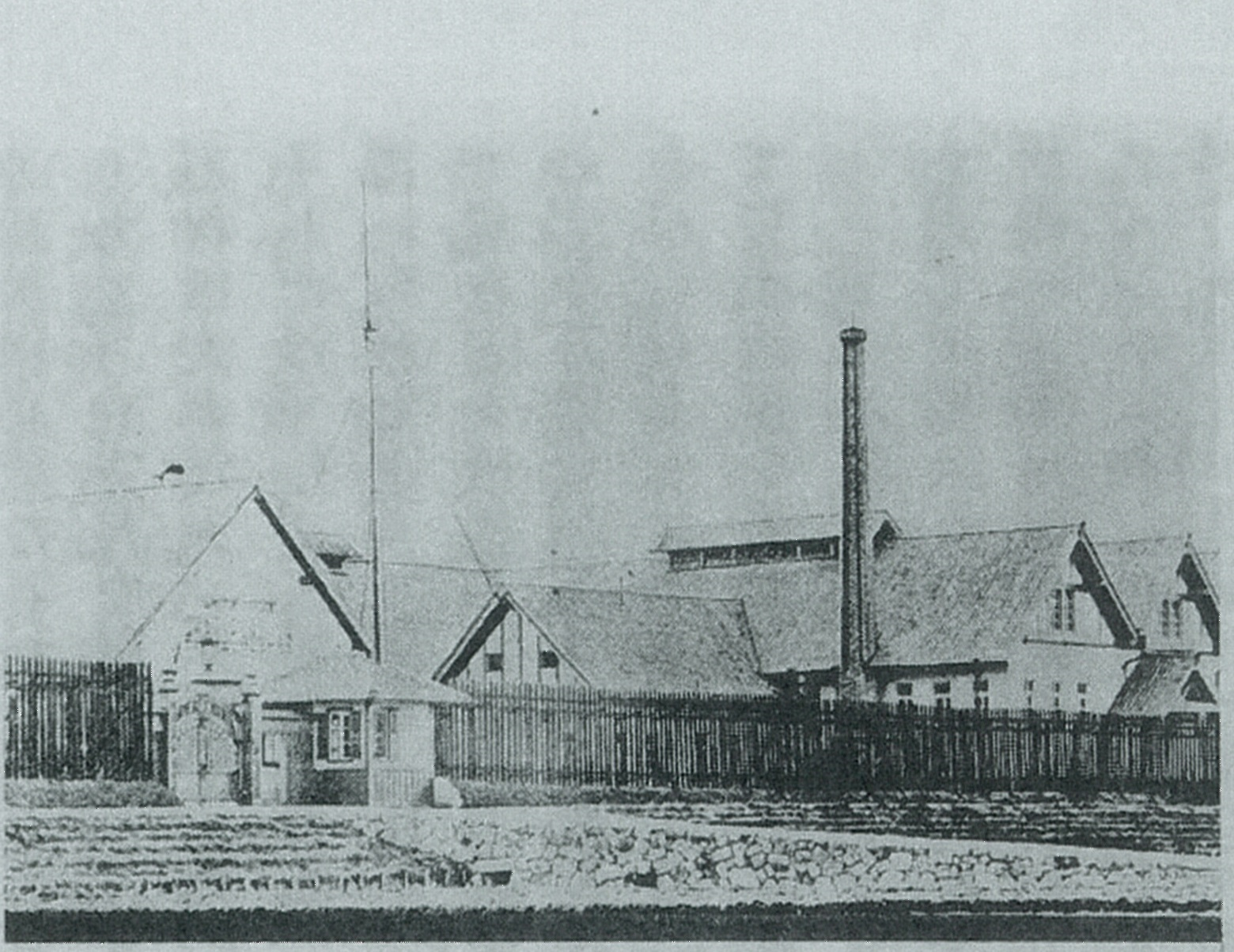 創業当初パピールのファブリック 1876年(明治9年)